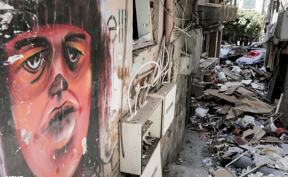 خسارات ها بعد از انفجار بیروت